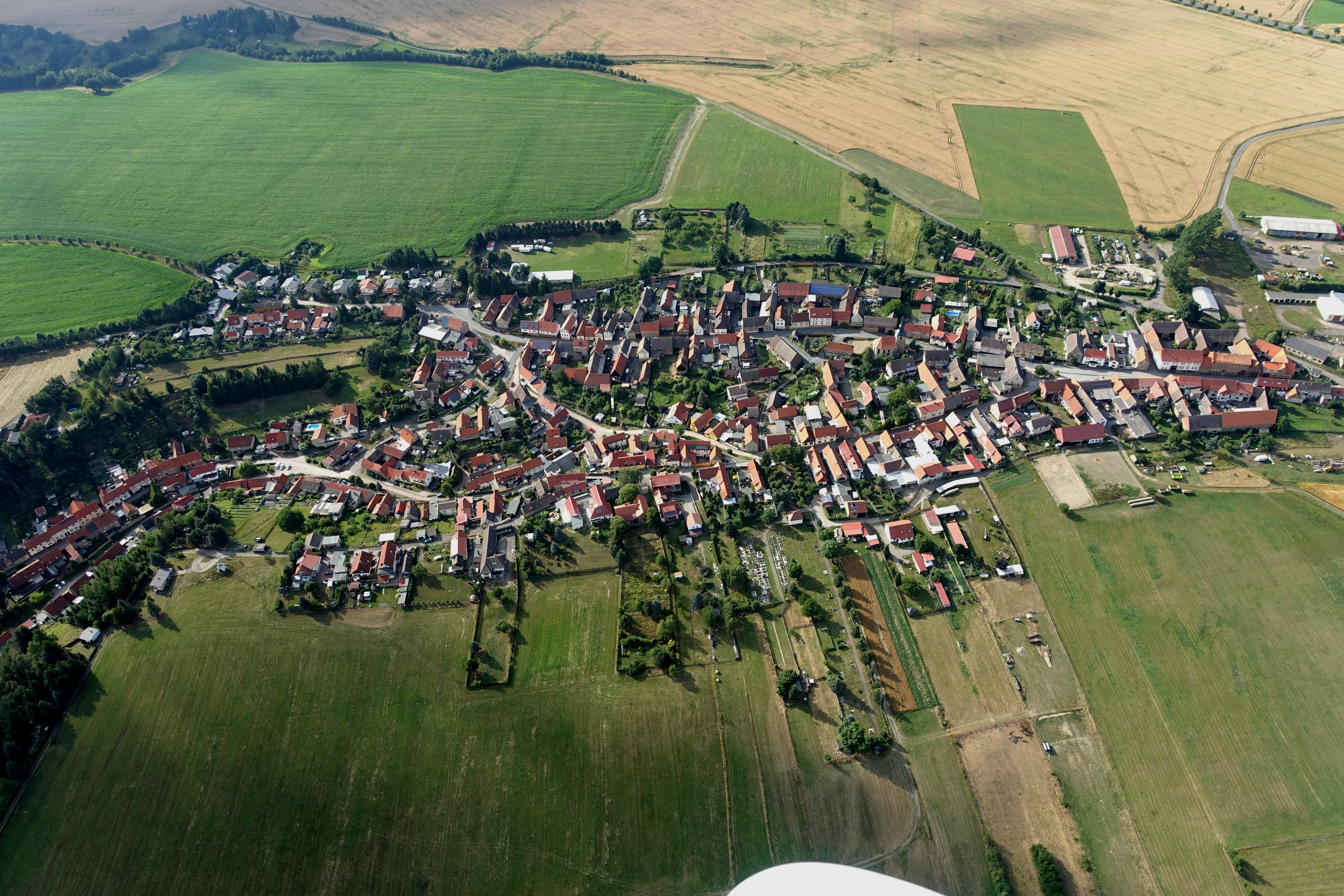 Luftbild von Braunschwende 2017